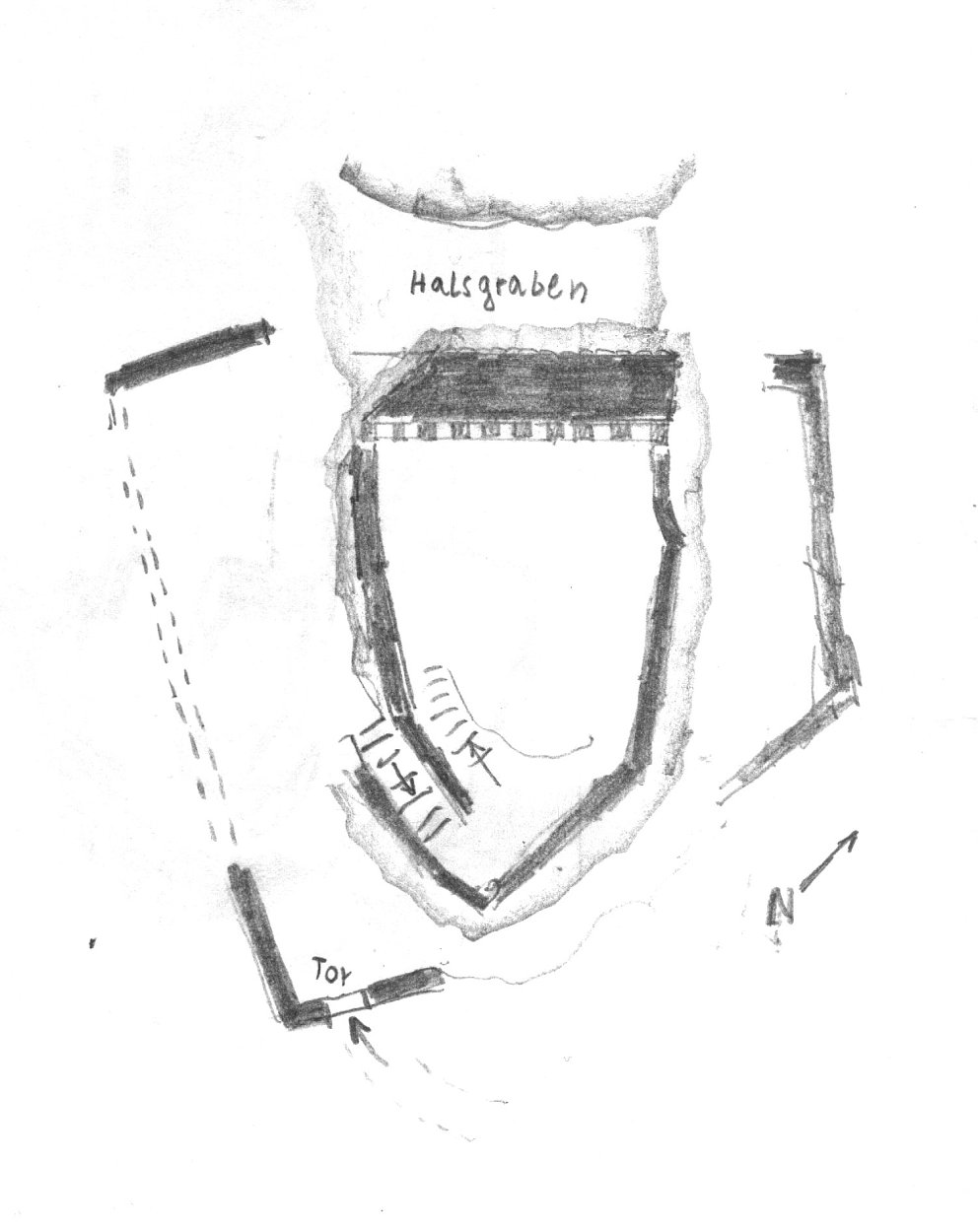 Burg Breitenstein, eigenhändige Grundriss-Skizze